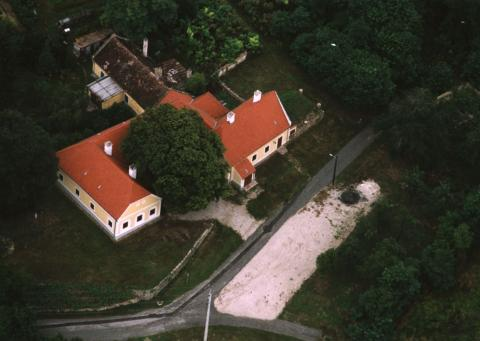 Vindornyalak, Hungary, aerialphotgraphy